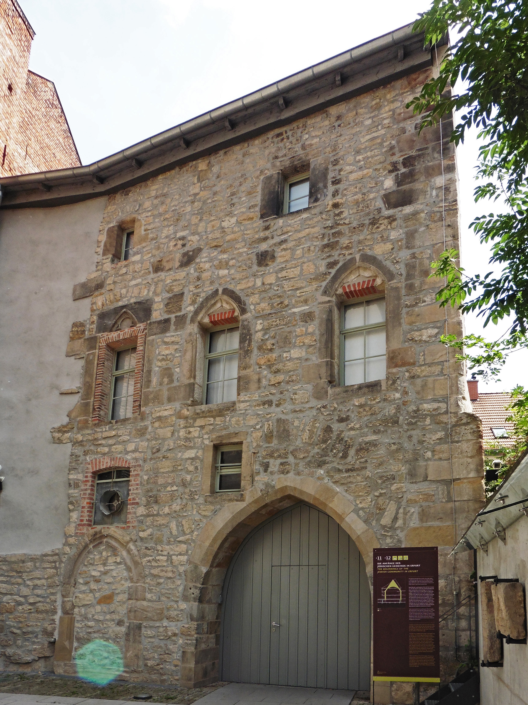 Alte Synagoge in der Waagegasse 8 in der Altstadt von Erfurt. Ansicht von Nordwesten. Erbaut um 1100 und bis zum Pogrom von 1349 Synagoge der jüdischen Gemeinde. Danach als Lagerhaus und in der 2. Hälfte des 19. Jahrhunderts gastronomisch genutzt. Heute Ausstellungsraum zur Kultur und Geschichte der jüdischen Gemeinde Erfurts im Mittelalter.